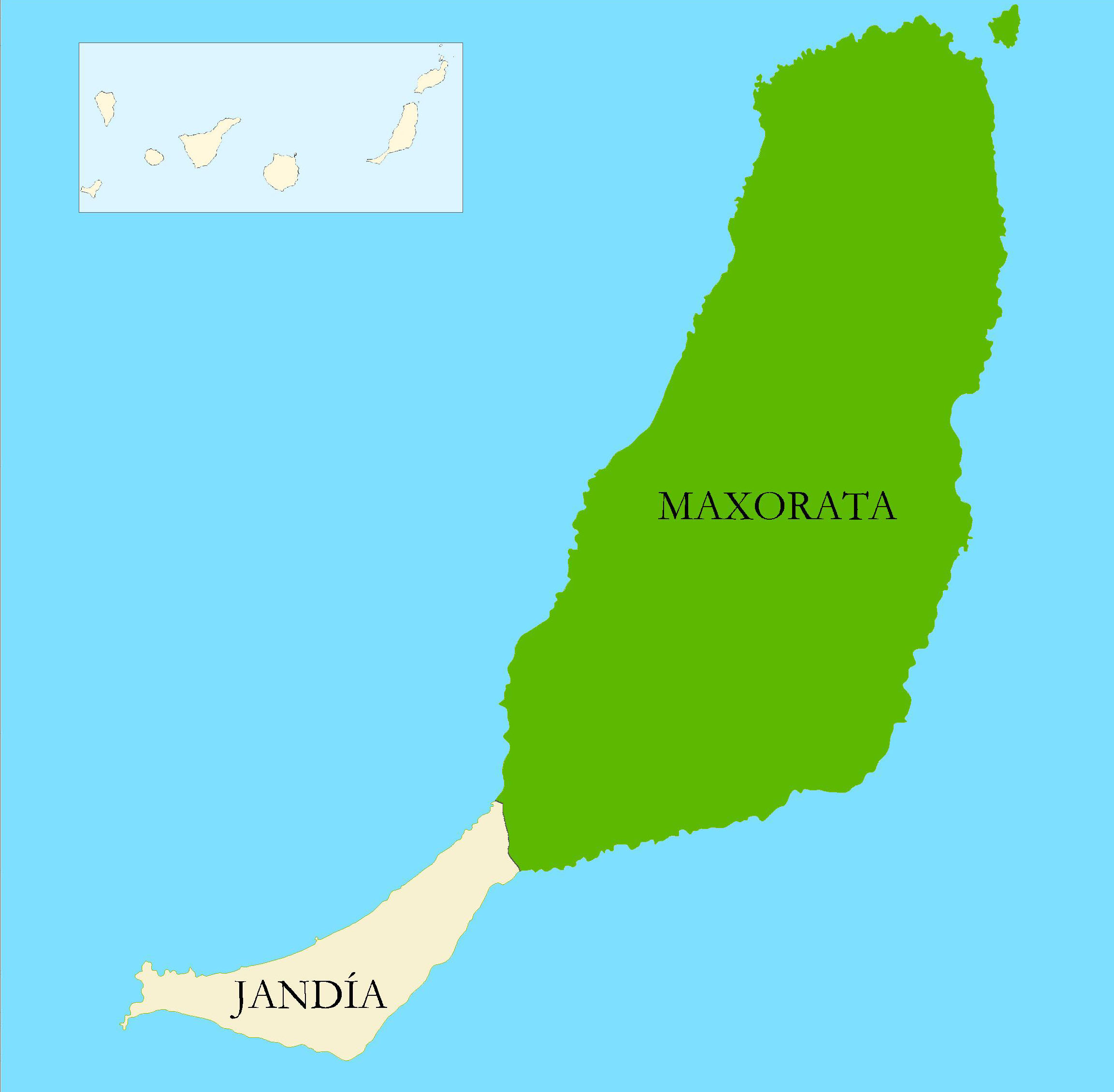 Cantón o reino de Maxorata (Fuerteventura) Tašlḥiyt/ⵜⴰⵛⵍⵃⵉⵜ: ⵜⴰⴳⴻⵍⴷⴰ ⵏ ⵎⴰⵃⵓⵔⴰⵜ (ⴻⵔⴱⴱⴰⵏ)